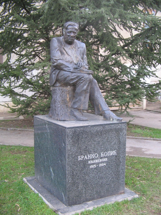 Monument of Branko Ćopić in a museum of Banja Luka